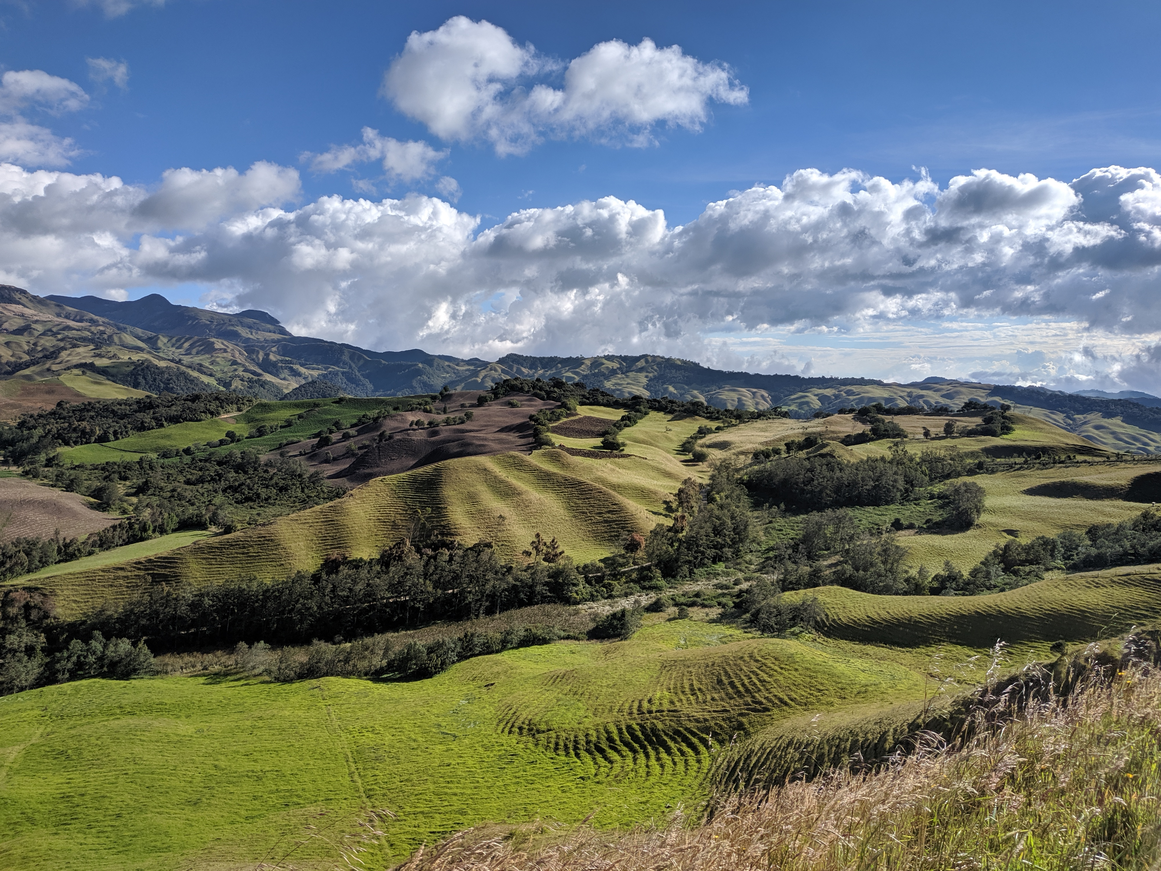 Nacimiento del Río Guarinó. Vereda Páramo ( Marulanda - Caldas - Colombia)